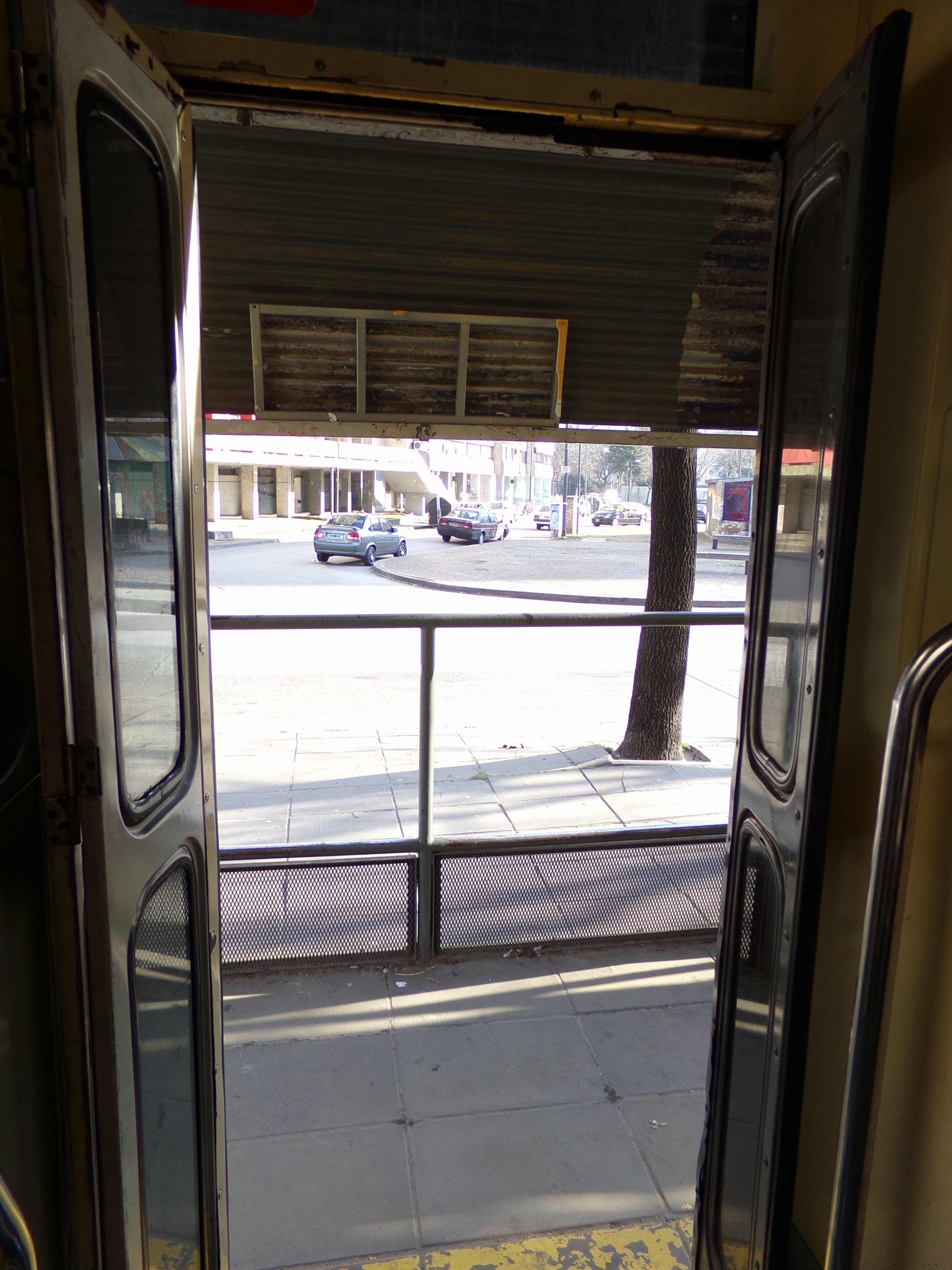 Premetro en estación Ana Díaz, con la señalética dañada.